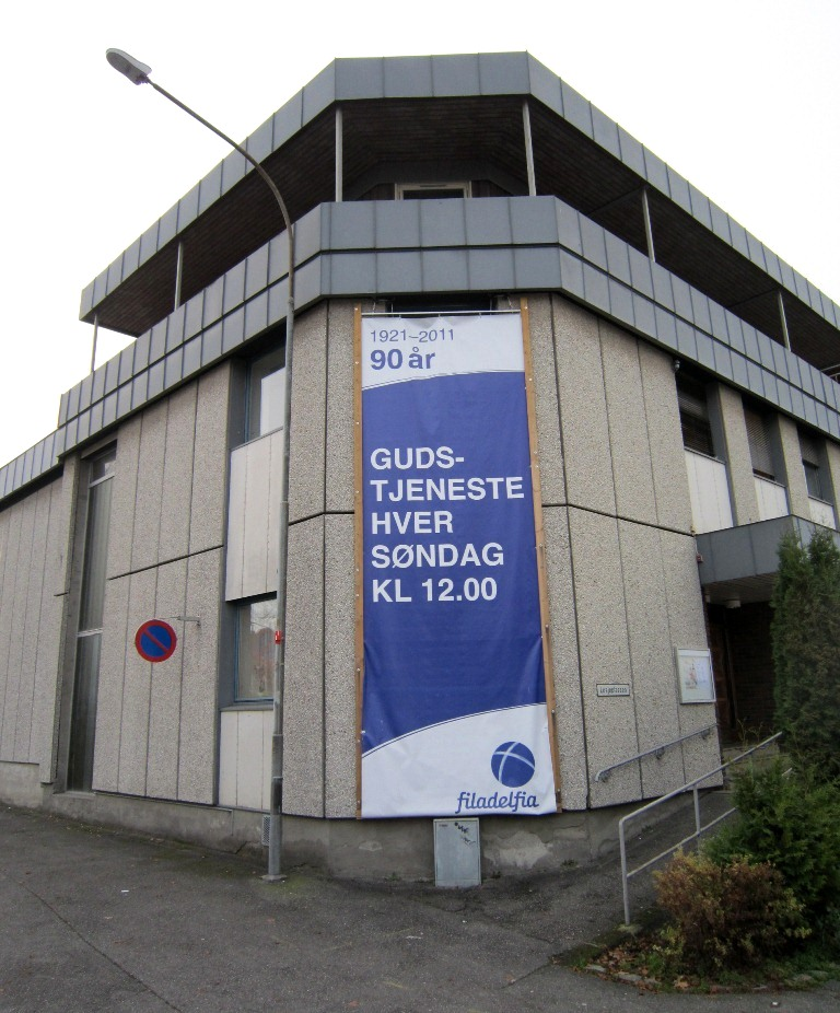 Filadelfia Drammen